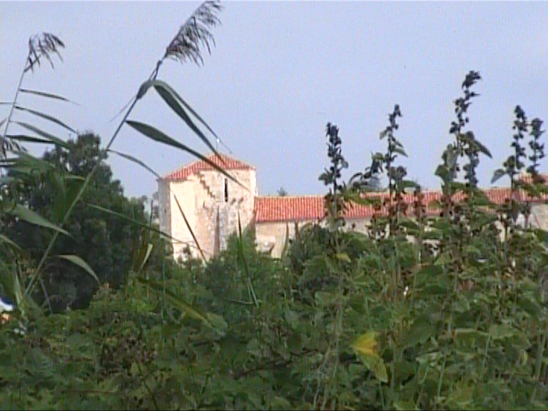 Église Saint-Benoist-sur-Mer.